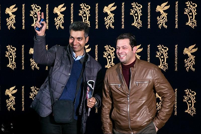 دومین روز سی‌وششمین جشنواره فیلم فجر - ۱ - دومین روز سی‌وششمین جشنواره فیلم فجر در کاخ این جشنواره واقع در پردیس سینمایی ملت برگزار شد.